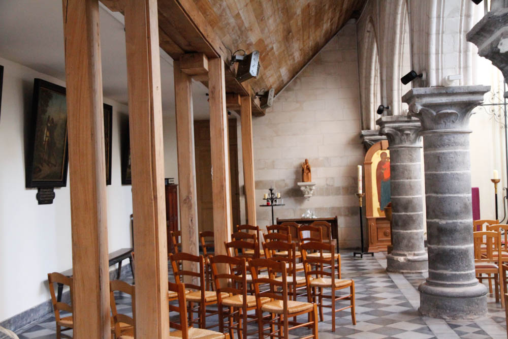 bas cote gauche